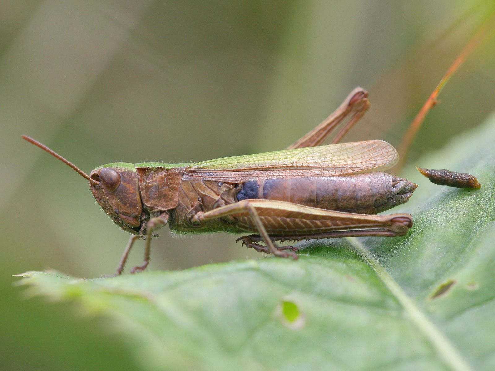 Wiesengrashüpfer (Chorthippus dorsatus), Weibchen